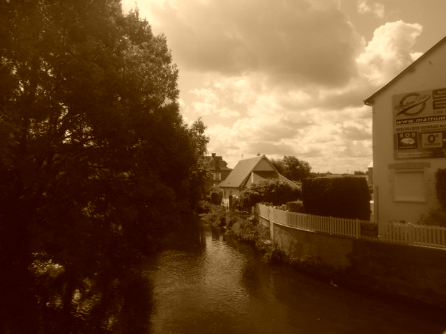 l'iton avec ses maison à Gravigny